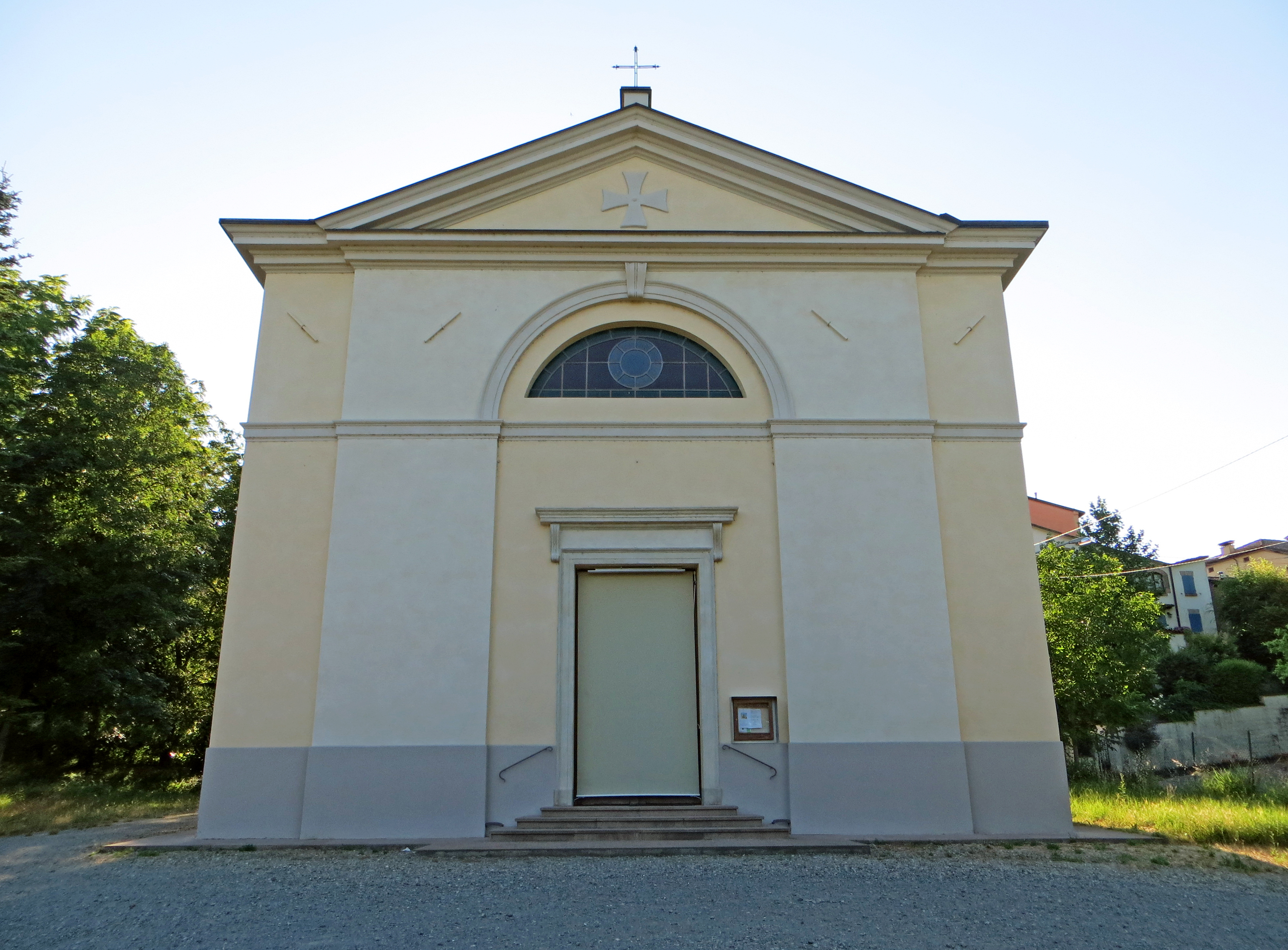 Chiesa di San Martino (Arola, Langhirano) - facciata